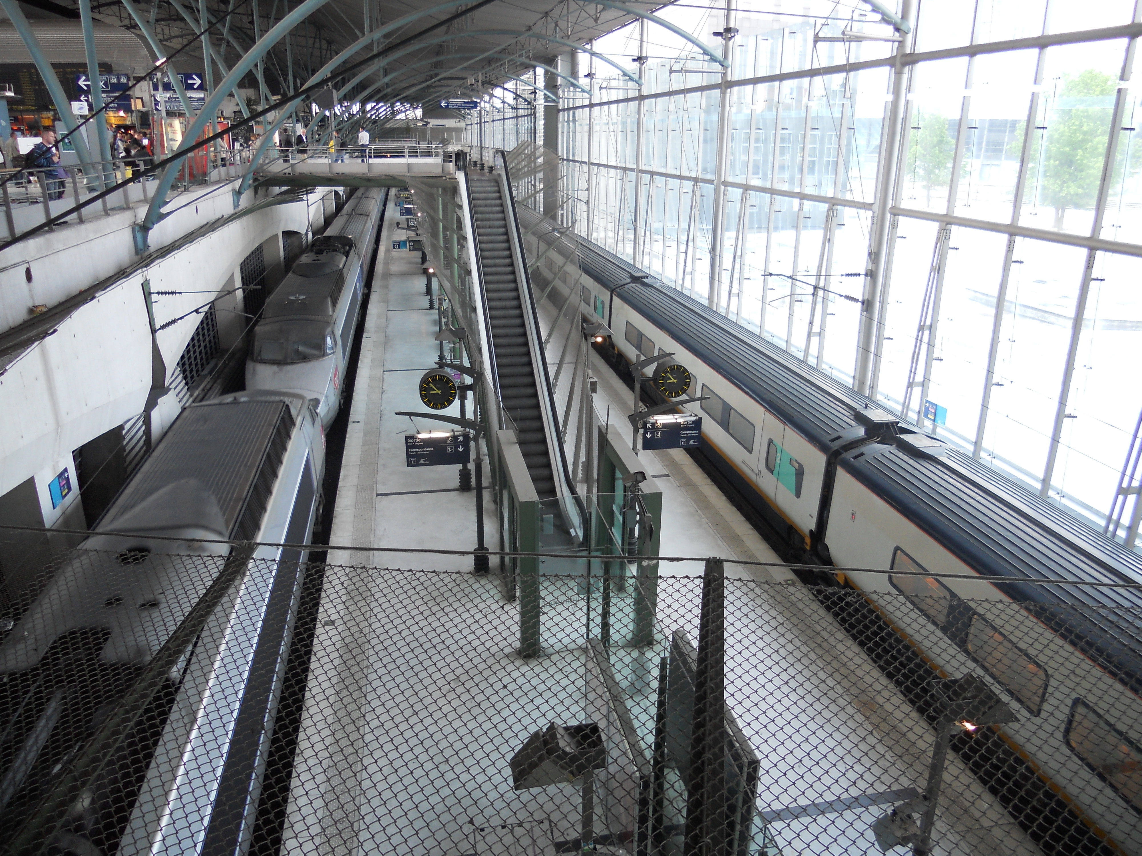 Vue des TGV en gare de Lille Europe